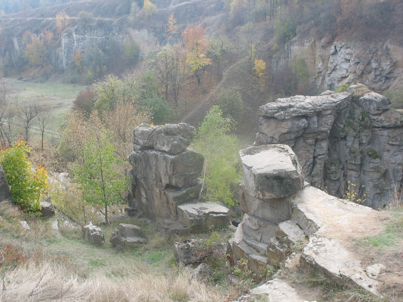 Буцький каньйон у смт Буки Маньківського району Черкаської області